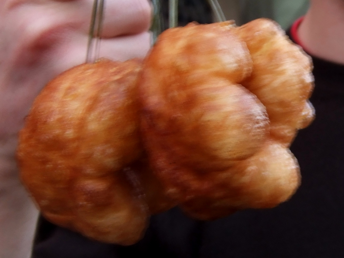 Moroccan donuts, Sfenj